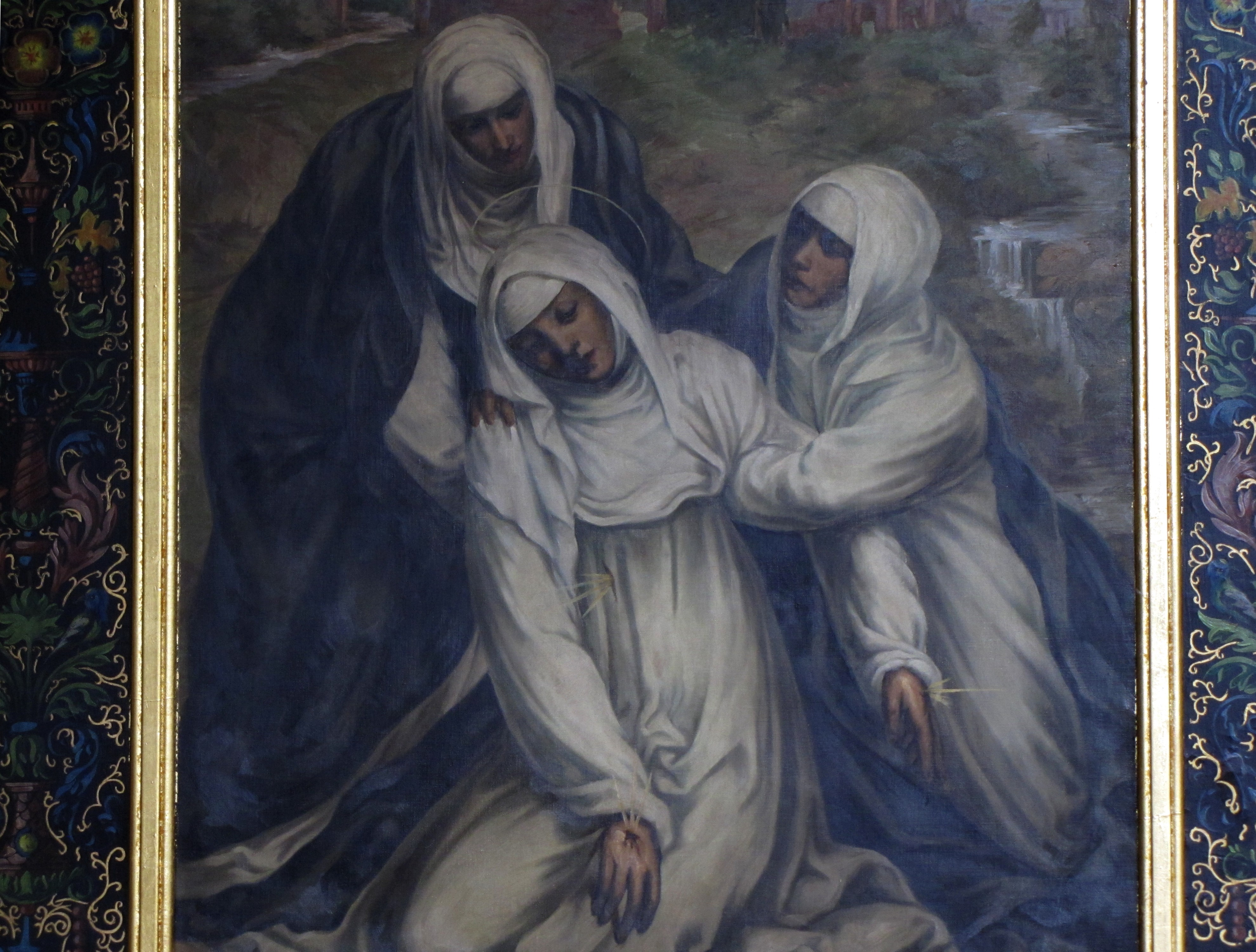 Alsace, Bas-Rhin, Église Saint-Pantaléon de Munchhausen (IA67007388). Tableau "Évanouissement de Ste-Catherine de Sienne" (Robert KUVEN, d'après Sodoma, XXe)